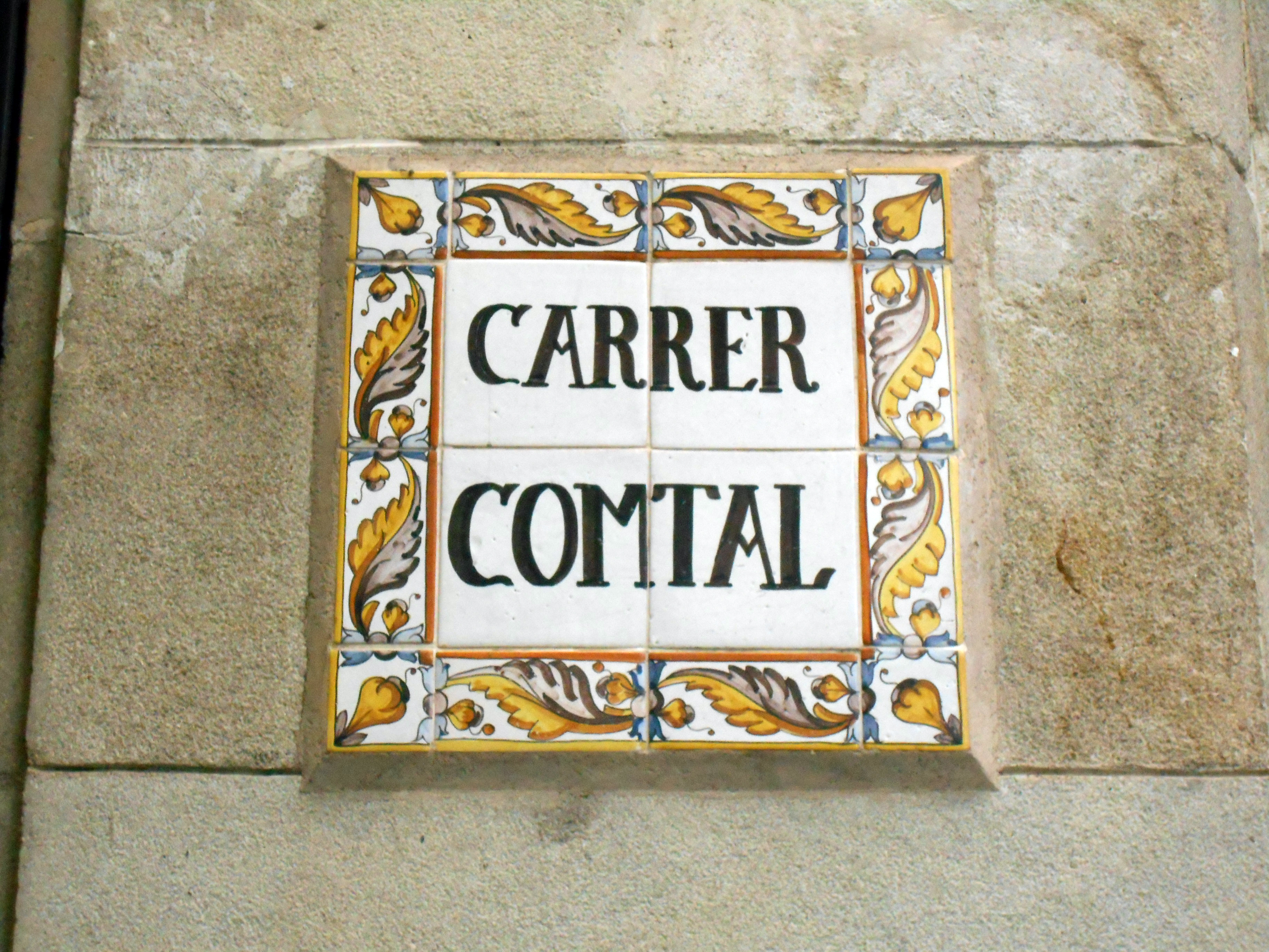 Calle Condal.